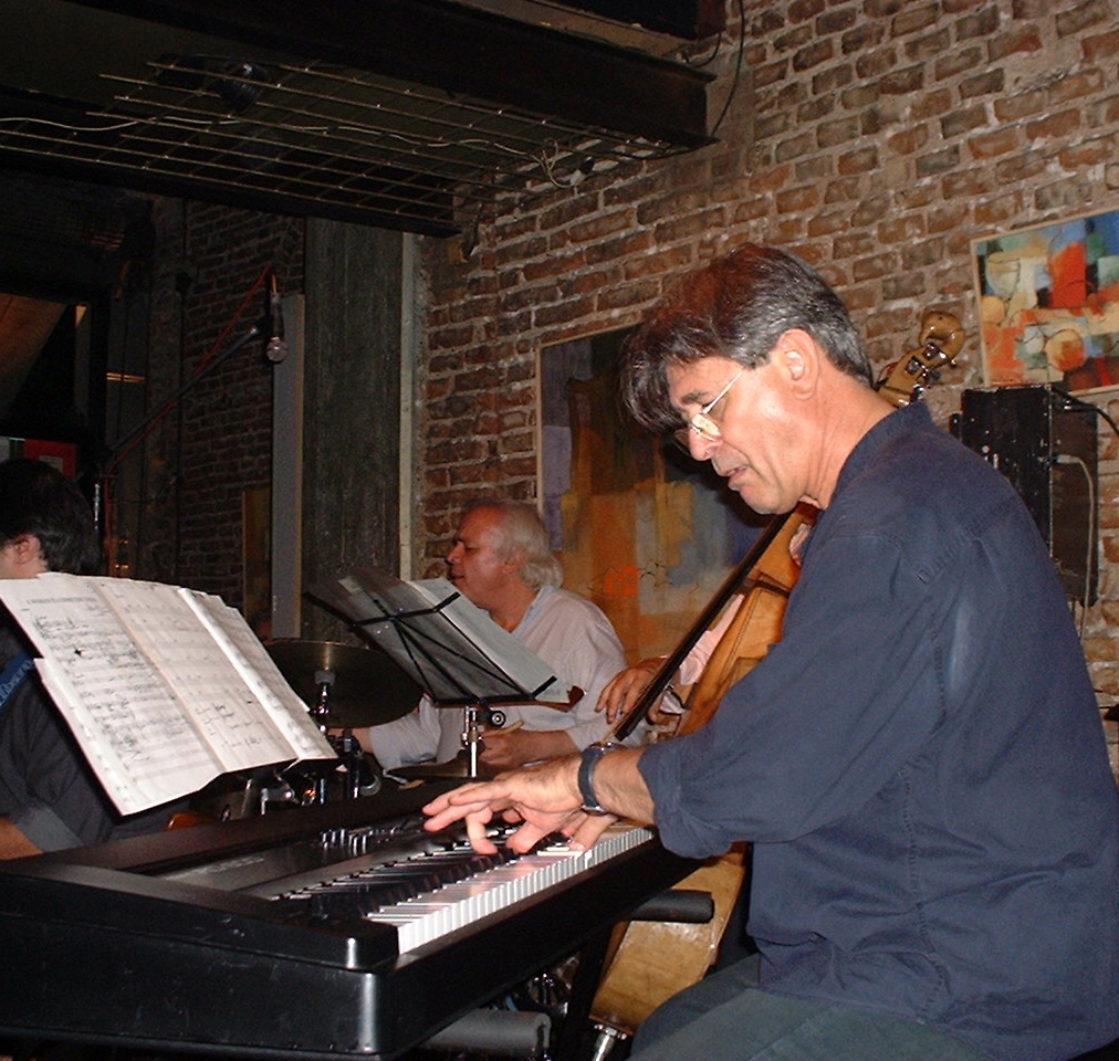 Alberto playing Porgy and Bess